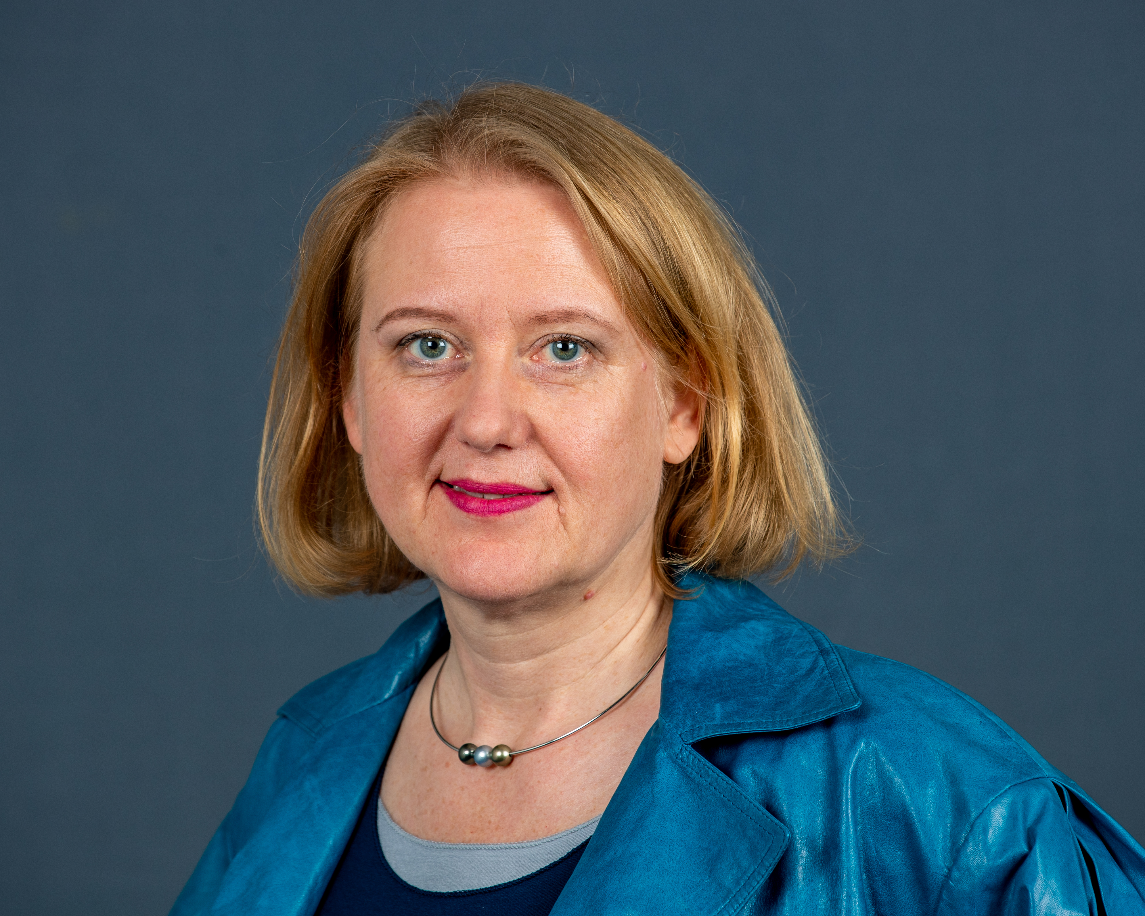 Lisa Paus, Bündnis 90/Die Grünen